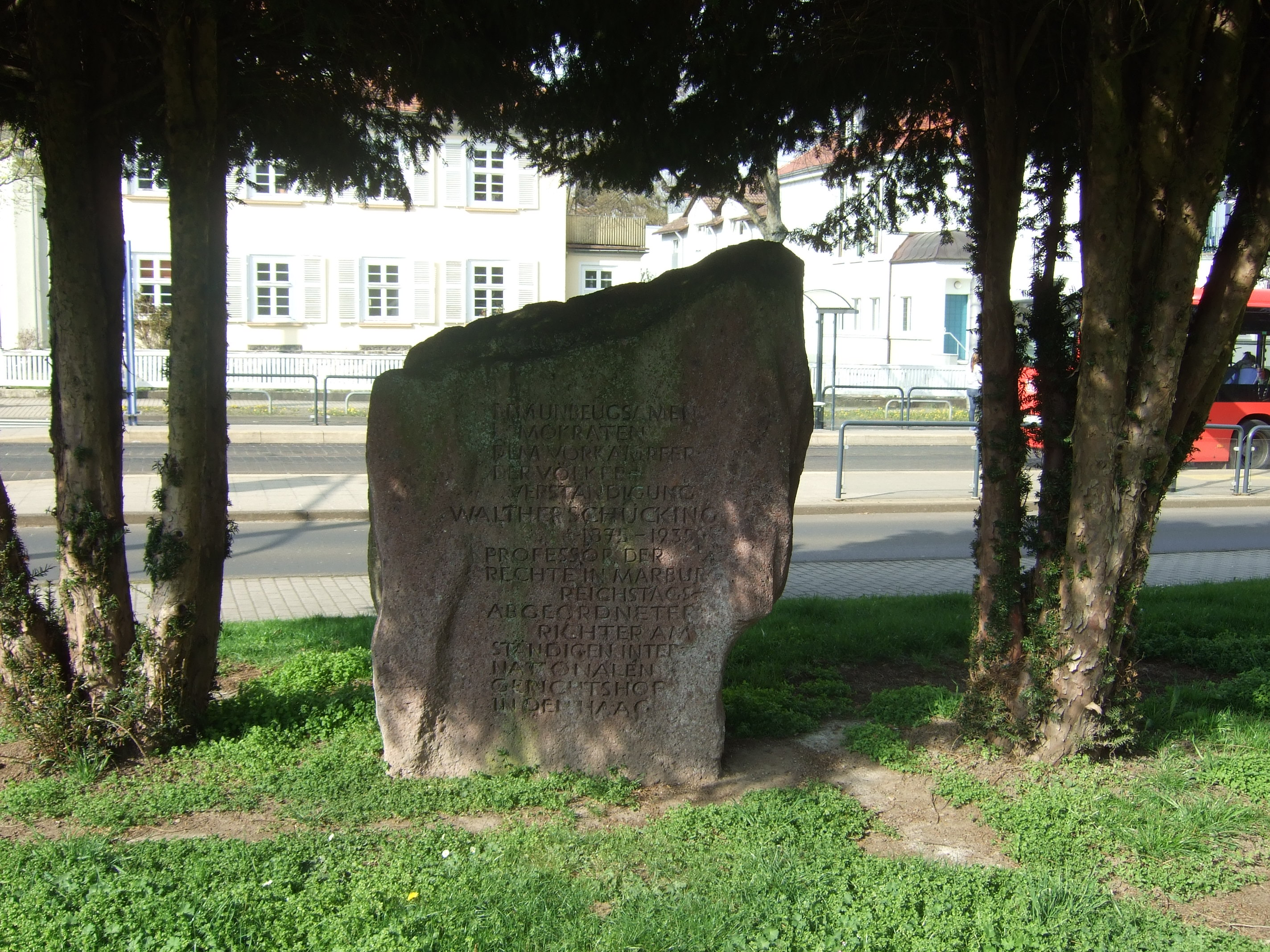 Walther Schücking Gedenkstein in Kassel, Vorderseite. Inschrift: DEM UNBEUGSAMEN DEMOKRATEN DEM VORKÄMPFER DER VÖLKER-VERSTÄNDIGUNG WALTHER SCHÜCKING 1875 - 1935 PROFESSOR DER RECHTE IN MARBURG REICHSTAGSABGEORDNETER RICHTER AM STÄNDIGEN INTERNATIONALEN GERICHTSHOF IN DEN HAAG